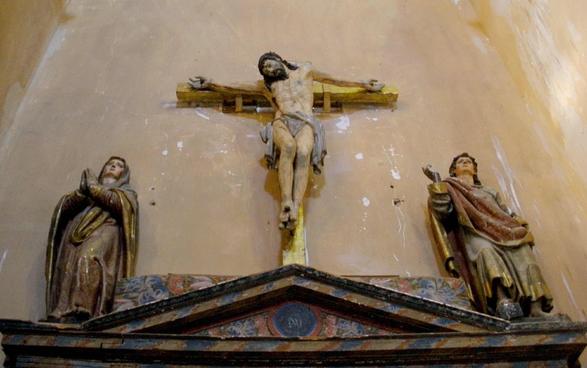 Calvario en la iglesia de Santa María de la Cuesta de Cuéllar (provincia de Segovia, Castilla y León, España).